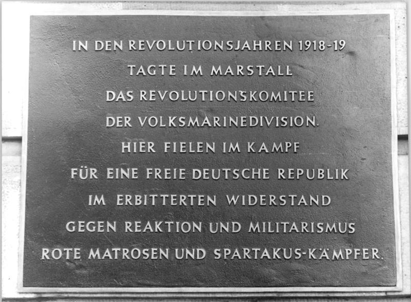 Für Bezieher des ADN-Reportagedienstes! Zum Beitrag: Weihnachtstage am Berliner Marstall Was heute eine Tafel über das Jahresende 1918 erzählt.ADN-ZB-Sturm 12.12.1978-ha.Eine schlichte Gedenktafel am ehemaligen Berliner Marstall erinnert an den blutigen Weihnachtsmorgen 1918,als der Sitz der damaligen Volksmarinedivision von der Konterrevolution angegriffen wurde.Elf rote Matrosen und viele zu Hilfe geeilte Berliner Arbeiter mußten bei diesem reaktionären Anschlag ihr Leben lassen.(Beachten Sie hierzu auch T1212/300 +302N+R9404,R26968+J0910/600/6)